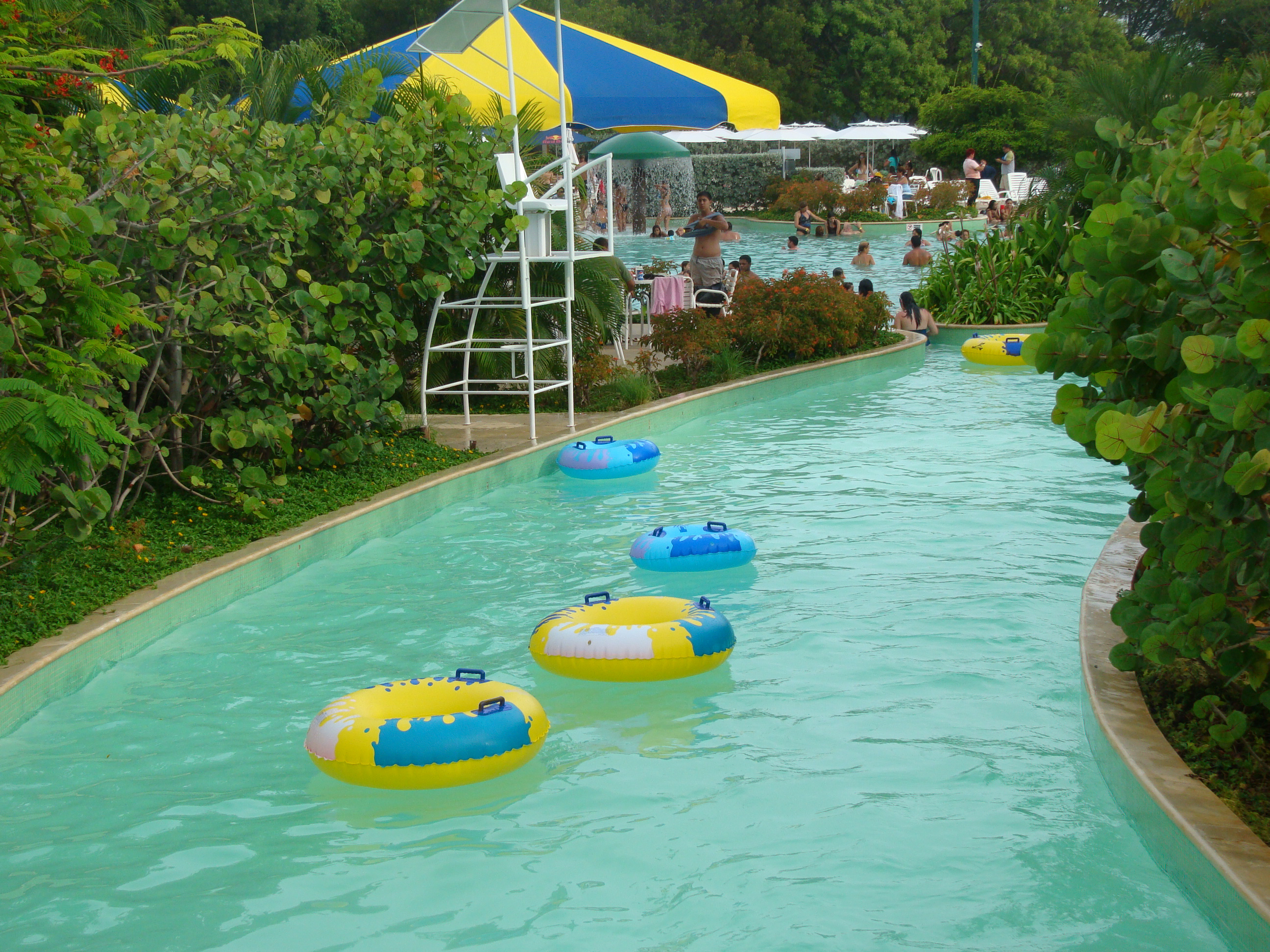 Parque acuático Aguamania ubicado en la Vereda del Lago. Maracaibo. Venezuela.